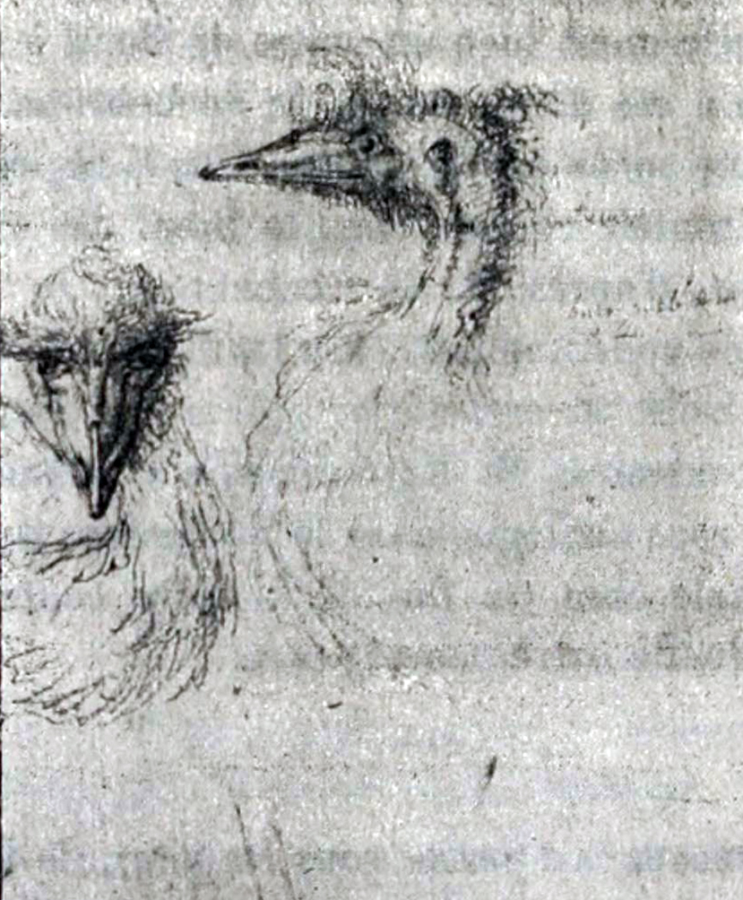 Life drawings of the extinct Black Emu from Kangaroo Island. Note sur L'Émeu noir (Dromaeus ater V.)de L'Île decrés (Australie) Bulletin du Muséum national d'histoire naturelle. Volume 5, 1899.